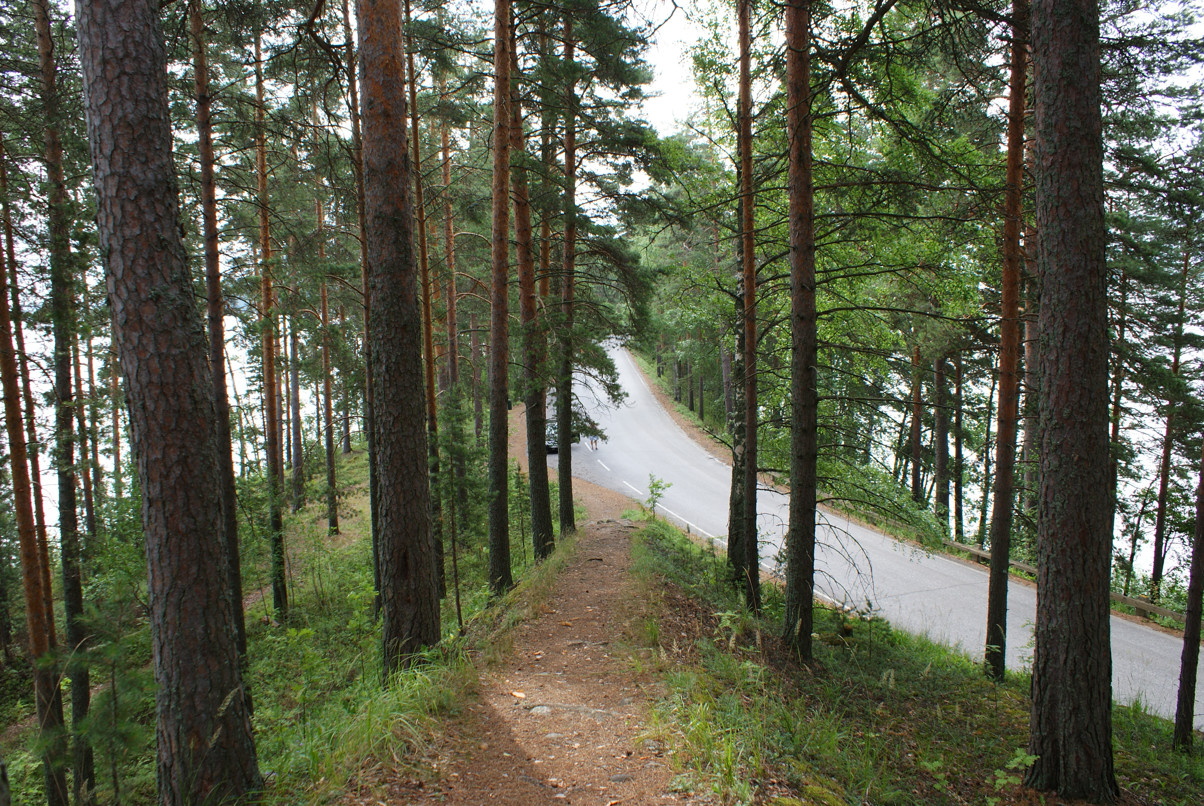 Punkaharjuvägen sedd från åsen.